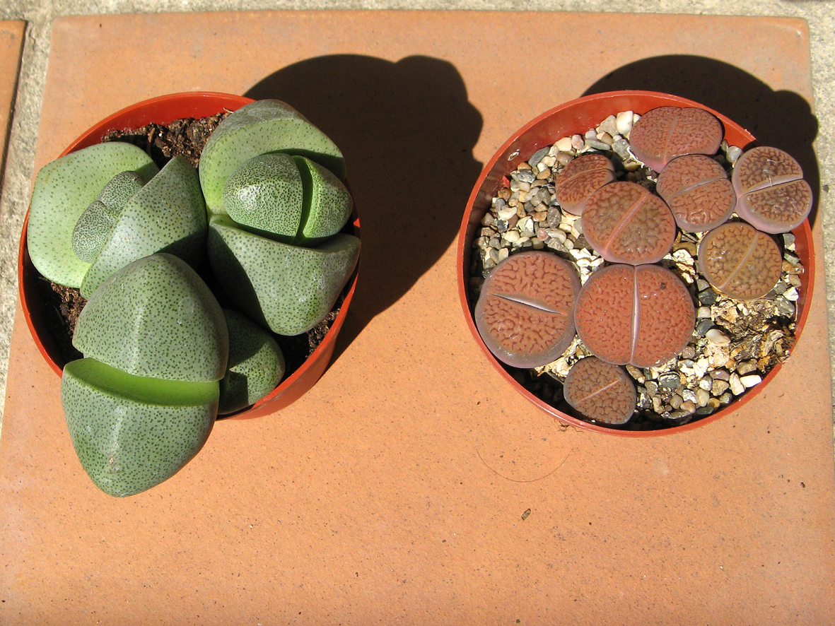 Pleiospilos bolusii and Lithops hookerii.